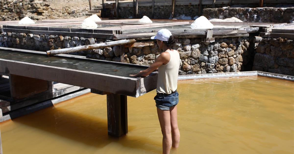 Spa Salino del Valle Salado de Añana, País Vasco, España